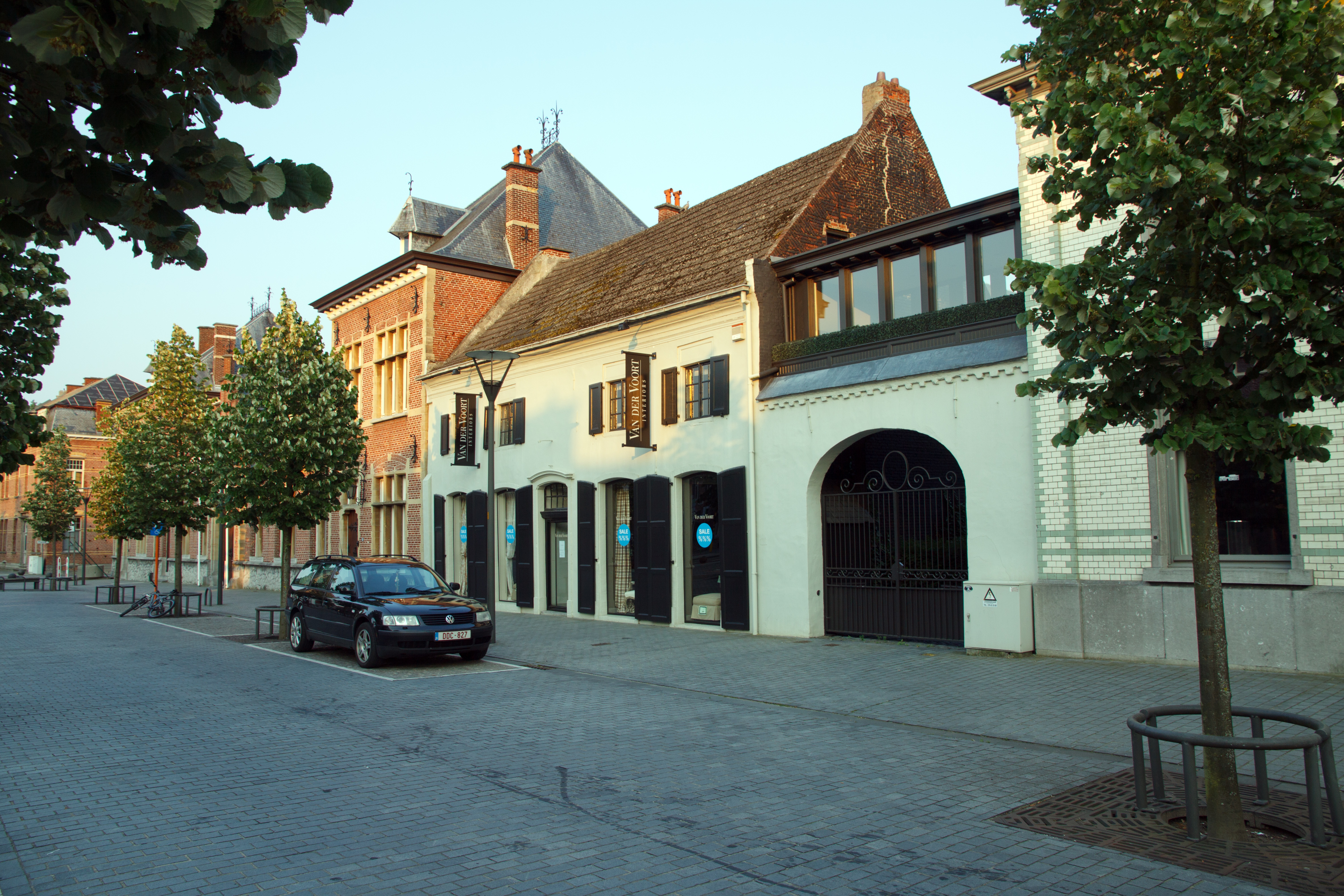 Markt 32, Mol